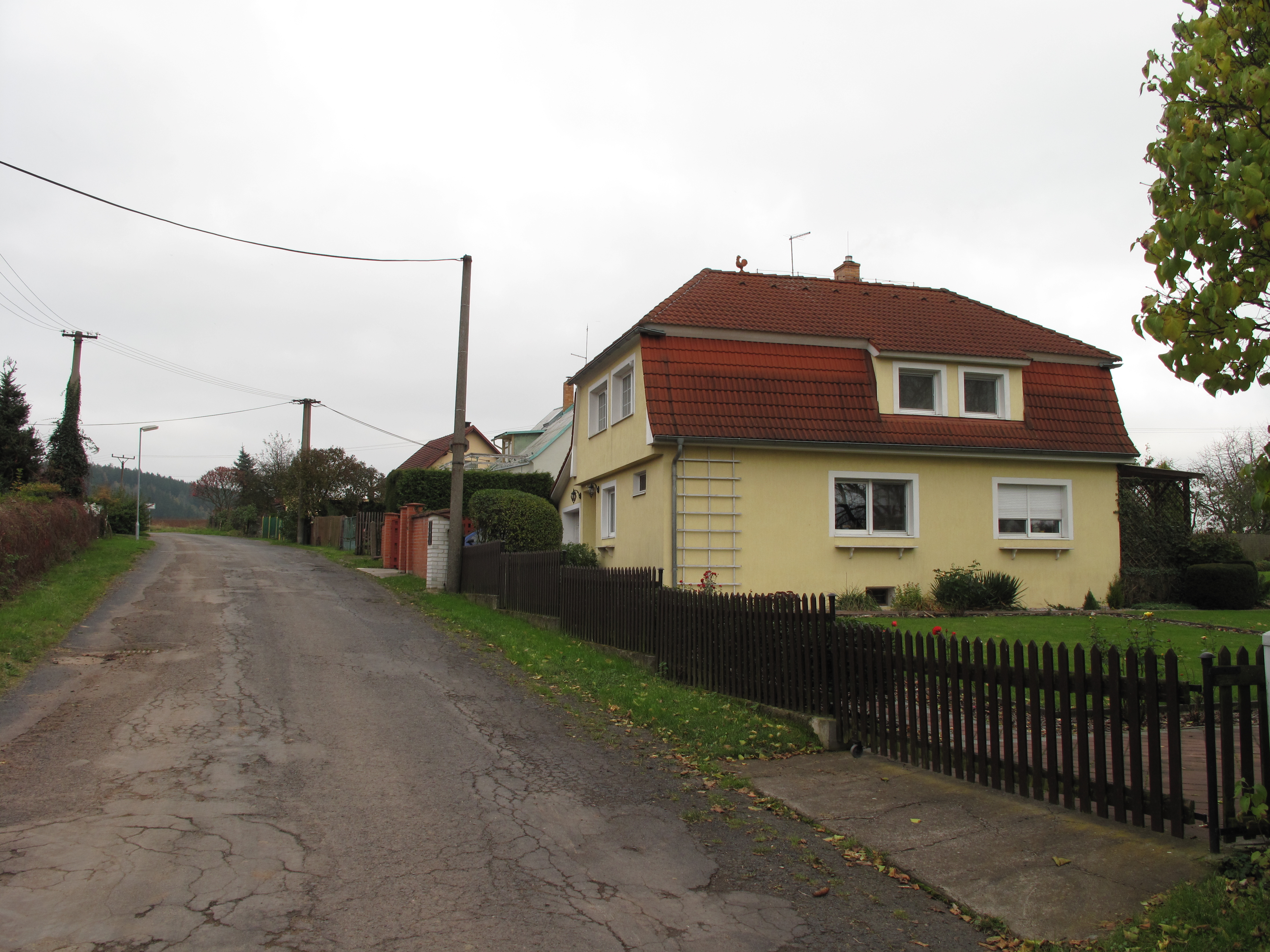 Žlutý dům v Chýškách. Okres Karlovy Vary, Česká republika.